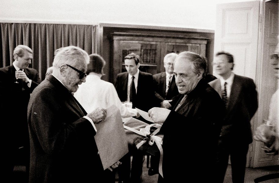 publisher Alfred Schlee with Pierre Boulez